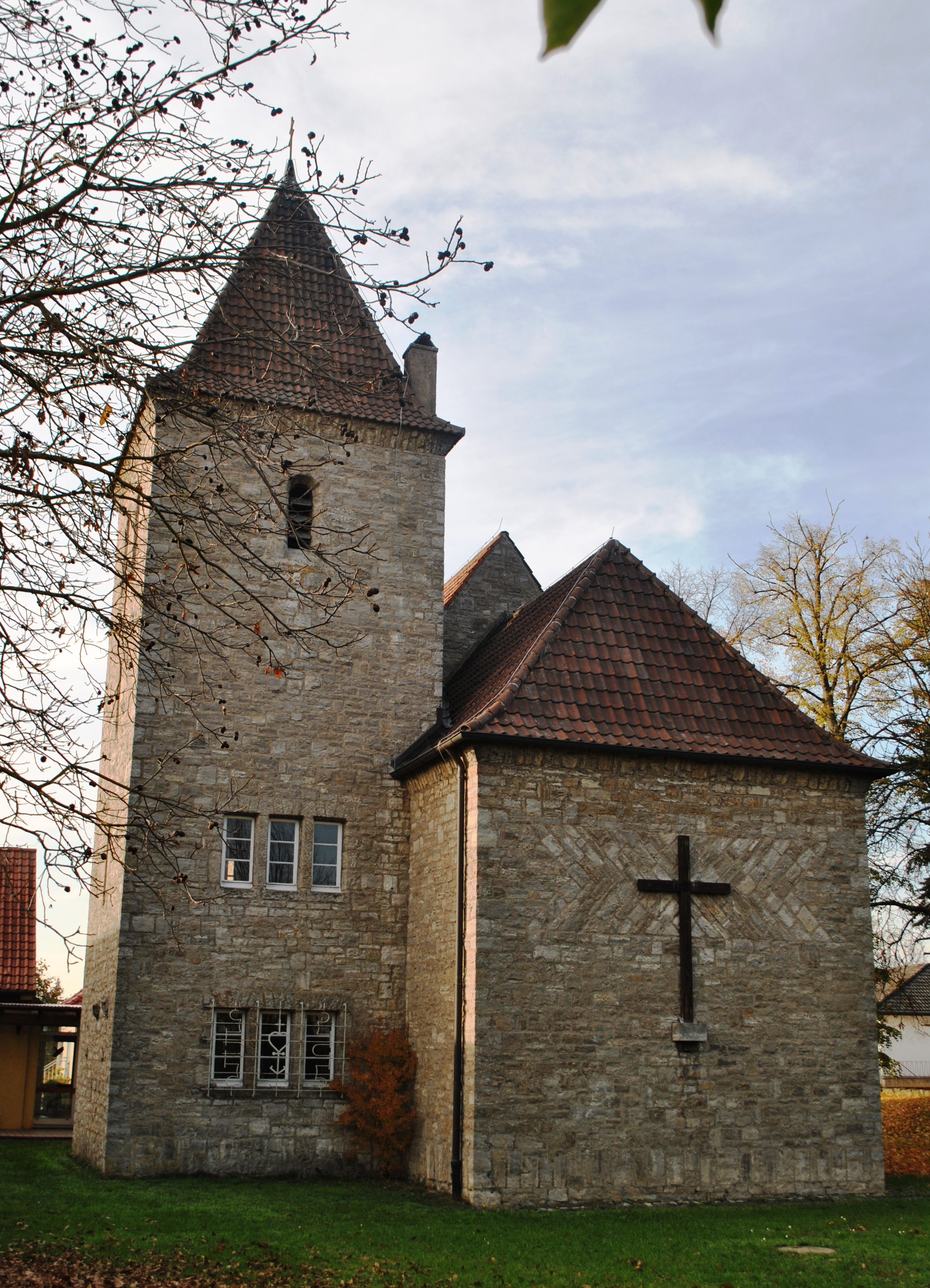 Katholische Pfarrkirche St. Johannes der Täufer kleiner Saalbau mit seitlich anschließendem Turm, unverputztes Kalksteinmauerwerk, erbaut 1932